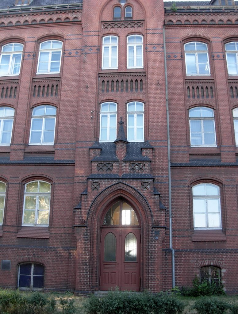 Budynek UTP w Bydgoszczy, dawniej Hippelschule, ul Kordeckiego 70-72 (Carl Meyer 1901-1902)